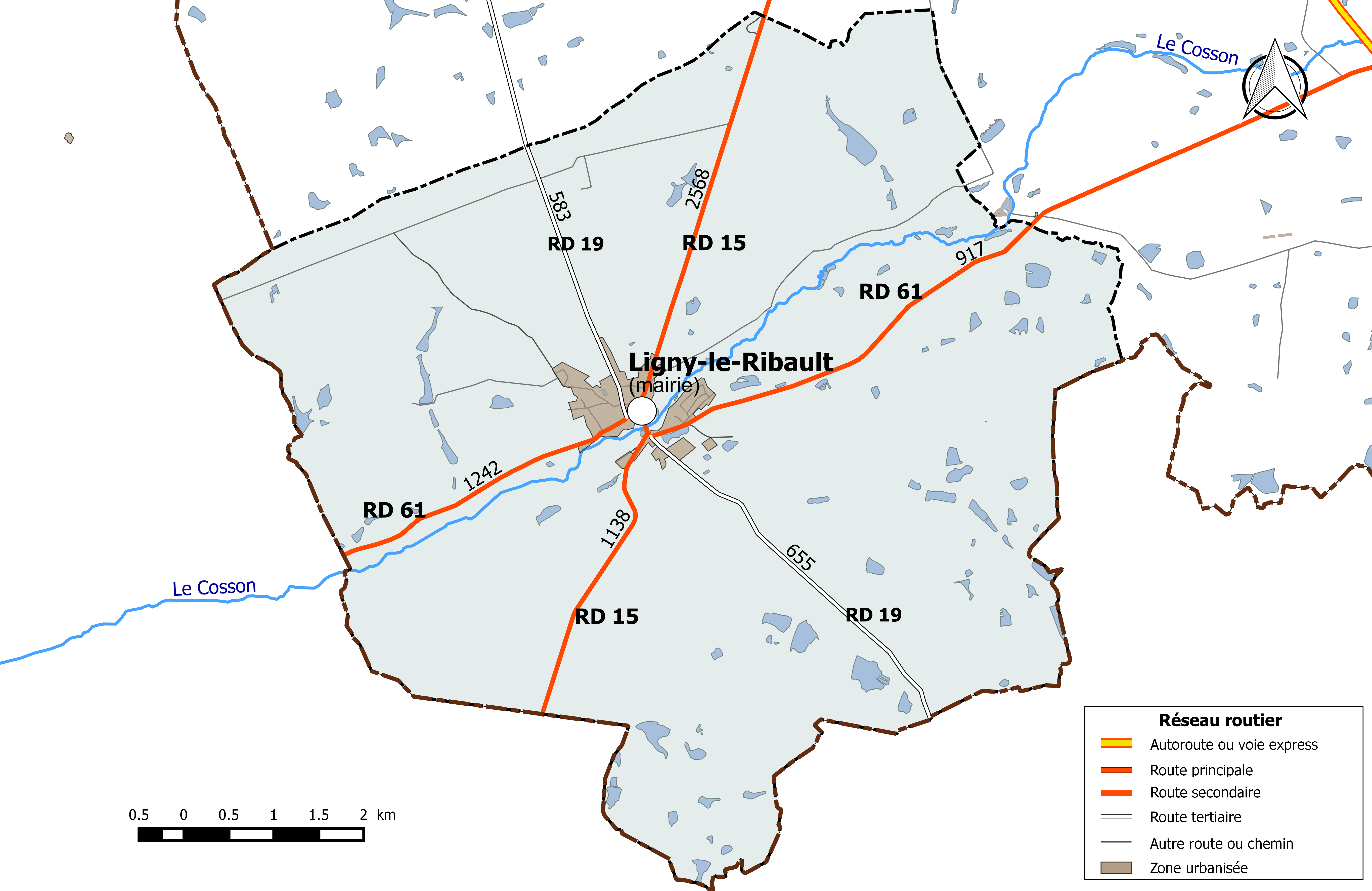 Carte du réseau routier de la commune de Ligny-le-Ribault.